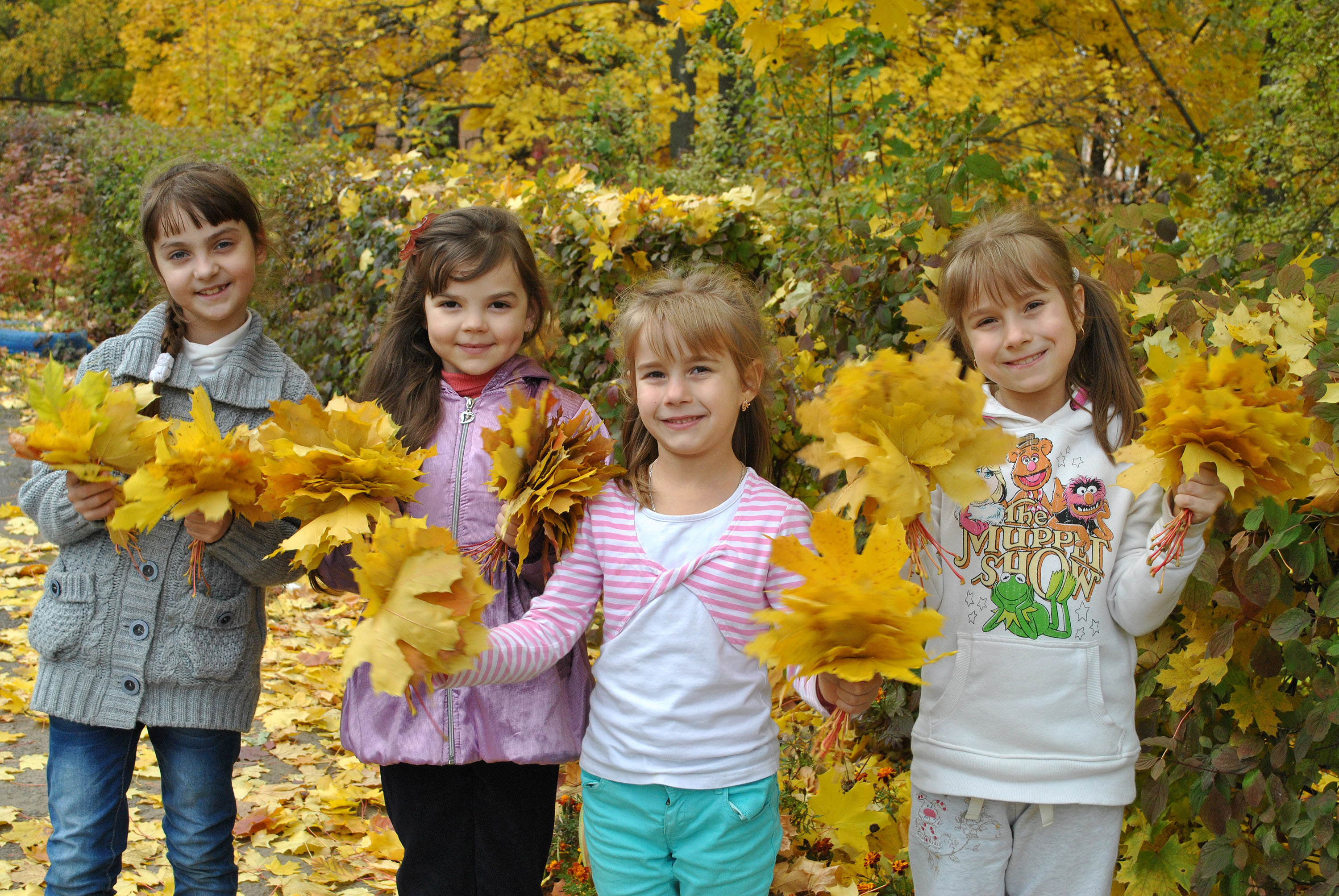 Учениці Тернопільської спеціалізованої школи № 7.